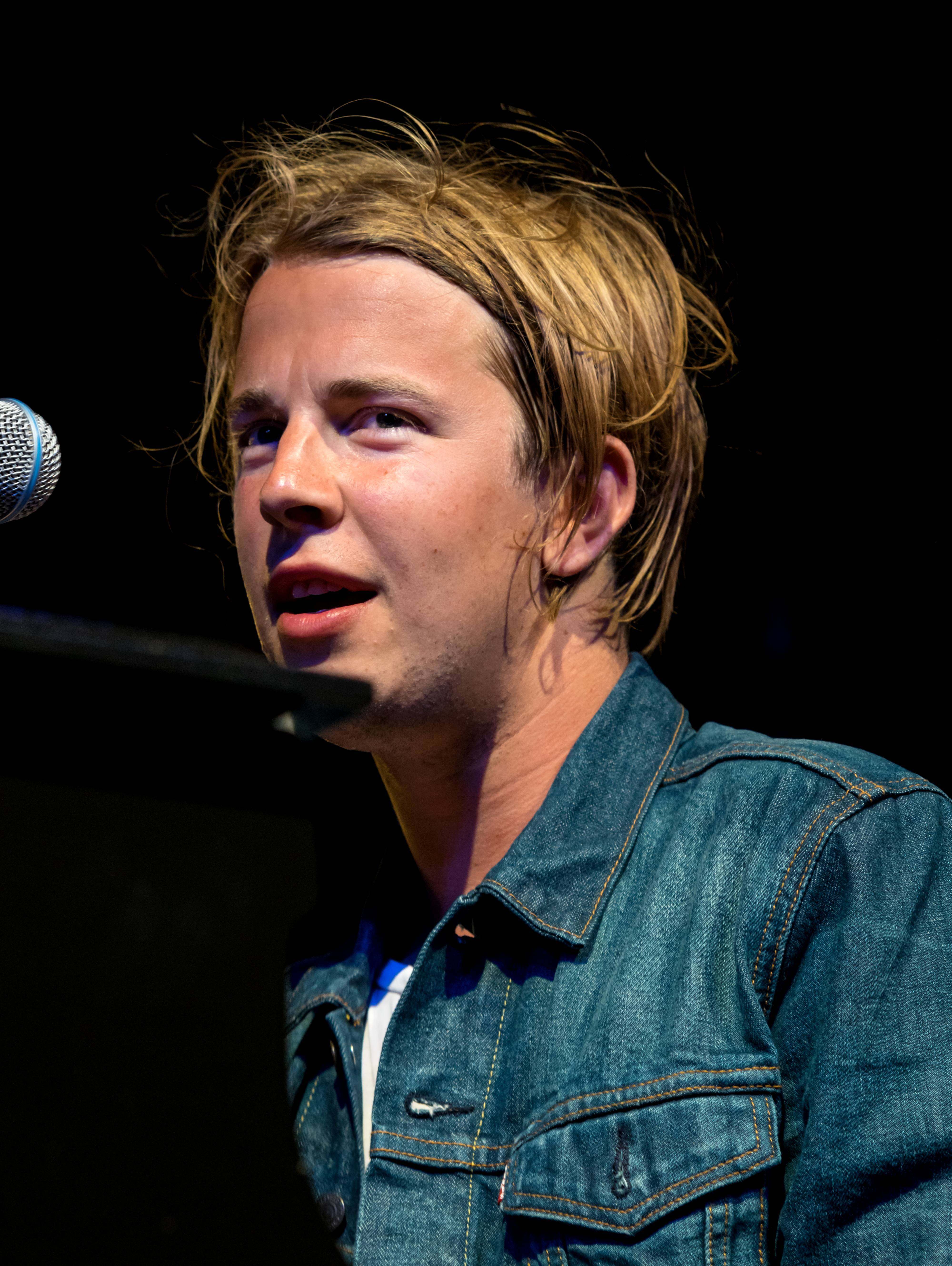 Bilder vom ZMF 2015 Tom Odell 16. Juli 2015